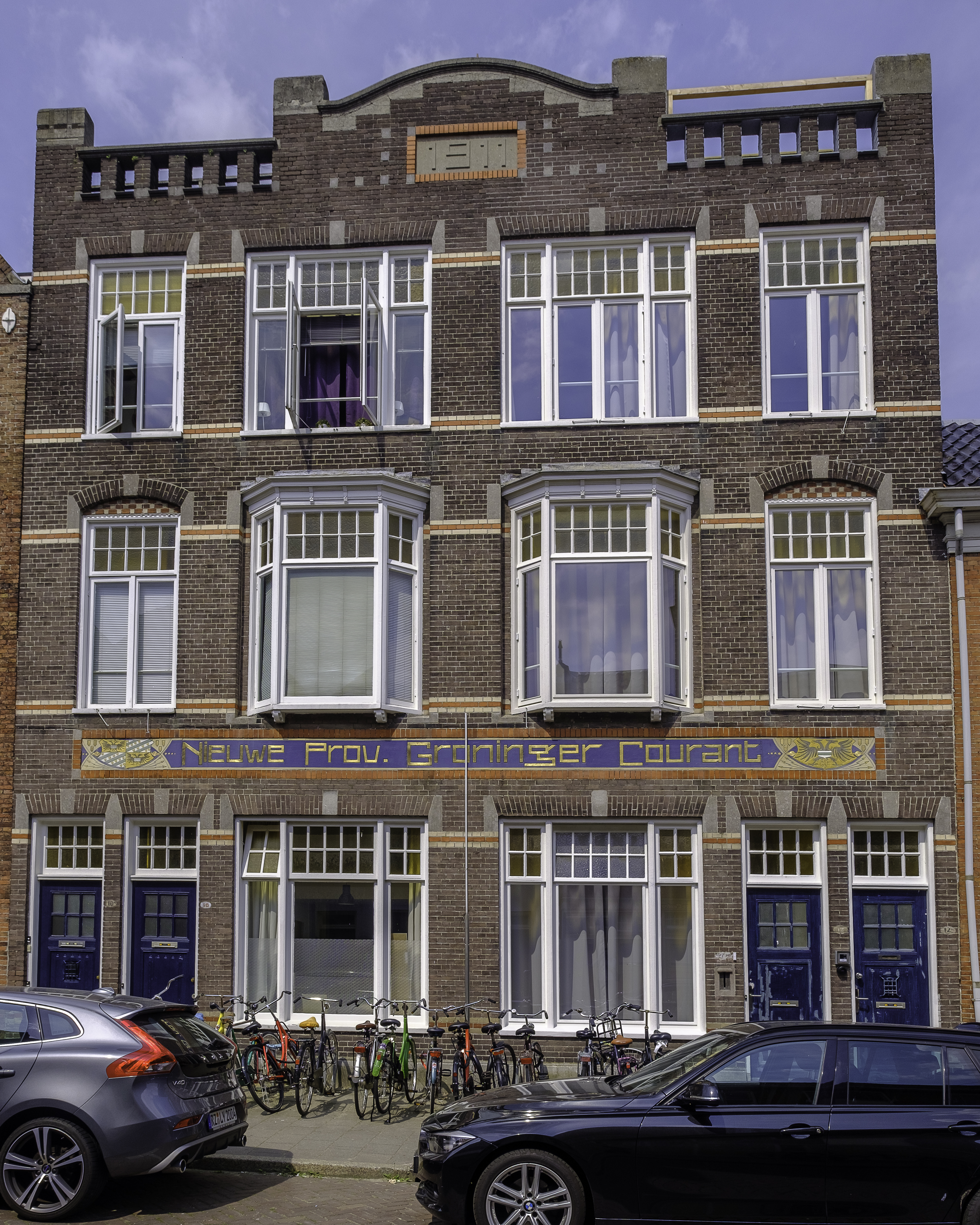 Wipstraat 12 in Groningen. Gebouw Nieuwe Provinciale Groninger Courant. Geen monument.